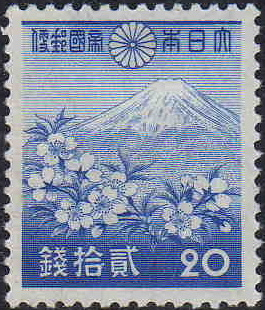 昭和15年に発行された普通20銭切手。描かれているのは日本を代表する富士山と桜花であるが、これは国際郵便料金用の切手であったためである。